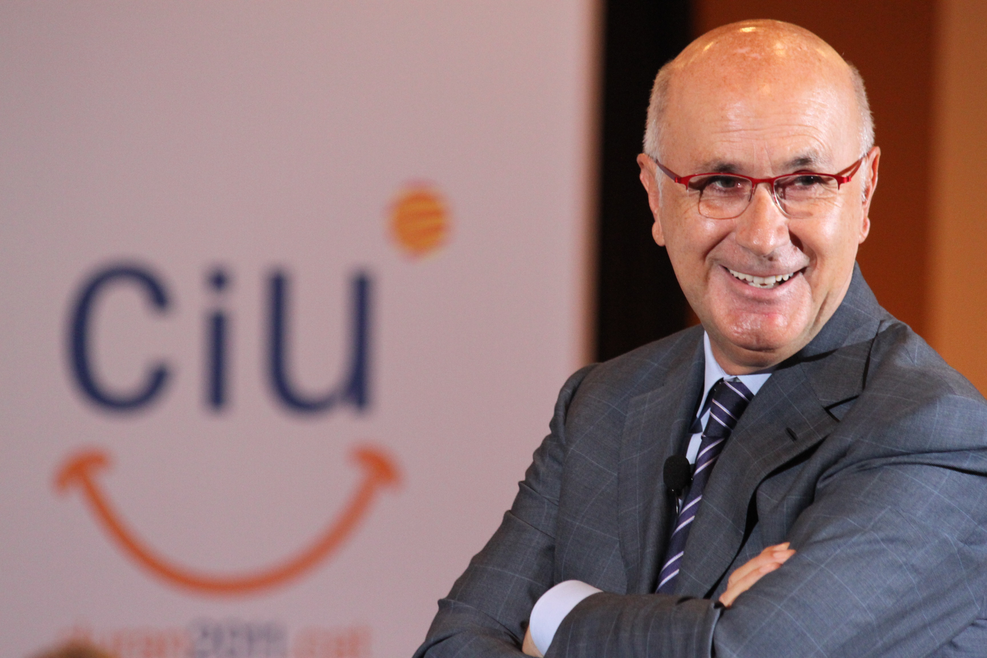 Generals 2011, Duran i Lleida.